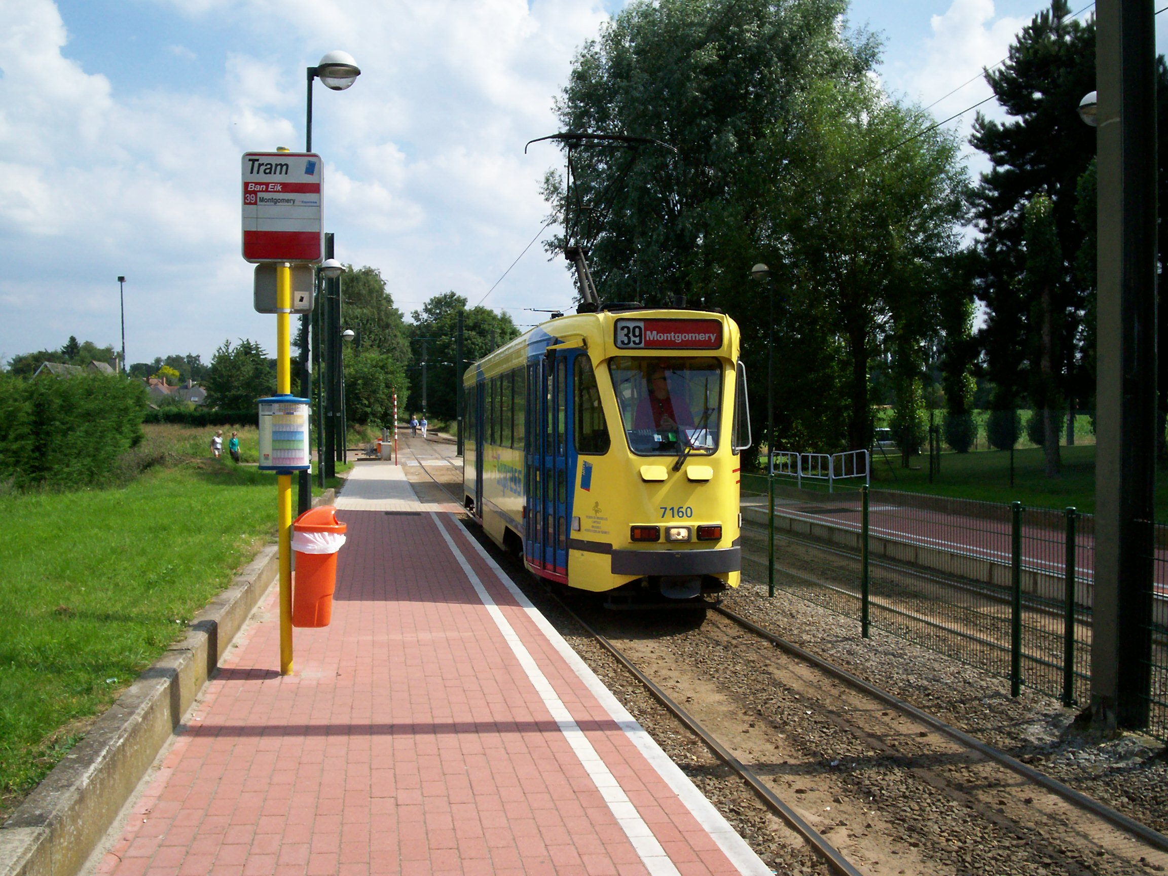 Un tram de type 7100 de la ligne 39 en station origine de Ban Eik et en direction de Montgomery